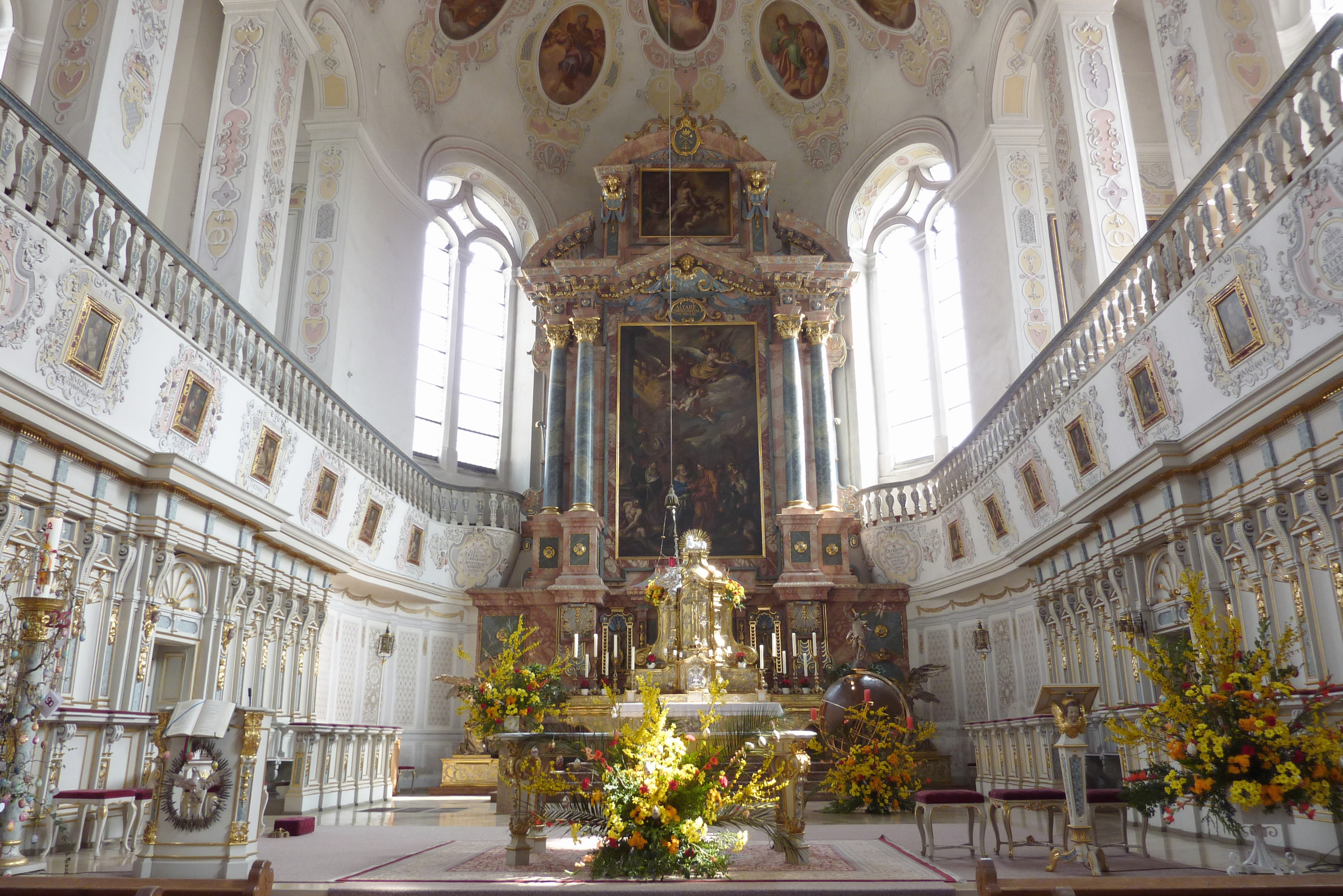 Katholische Pfarrkirche Basilika St. Peter (Dillingen) in Dillingen an der Donau (Bayern), Chor